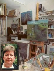 Wesselius.